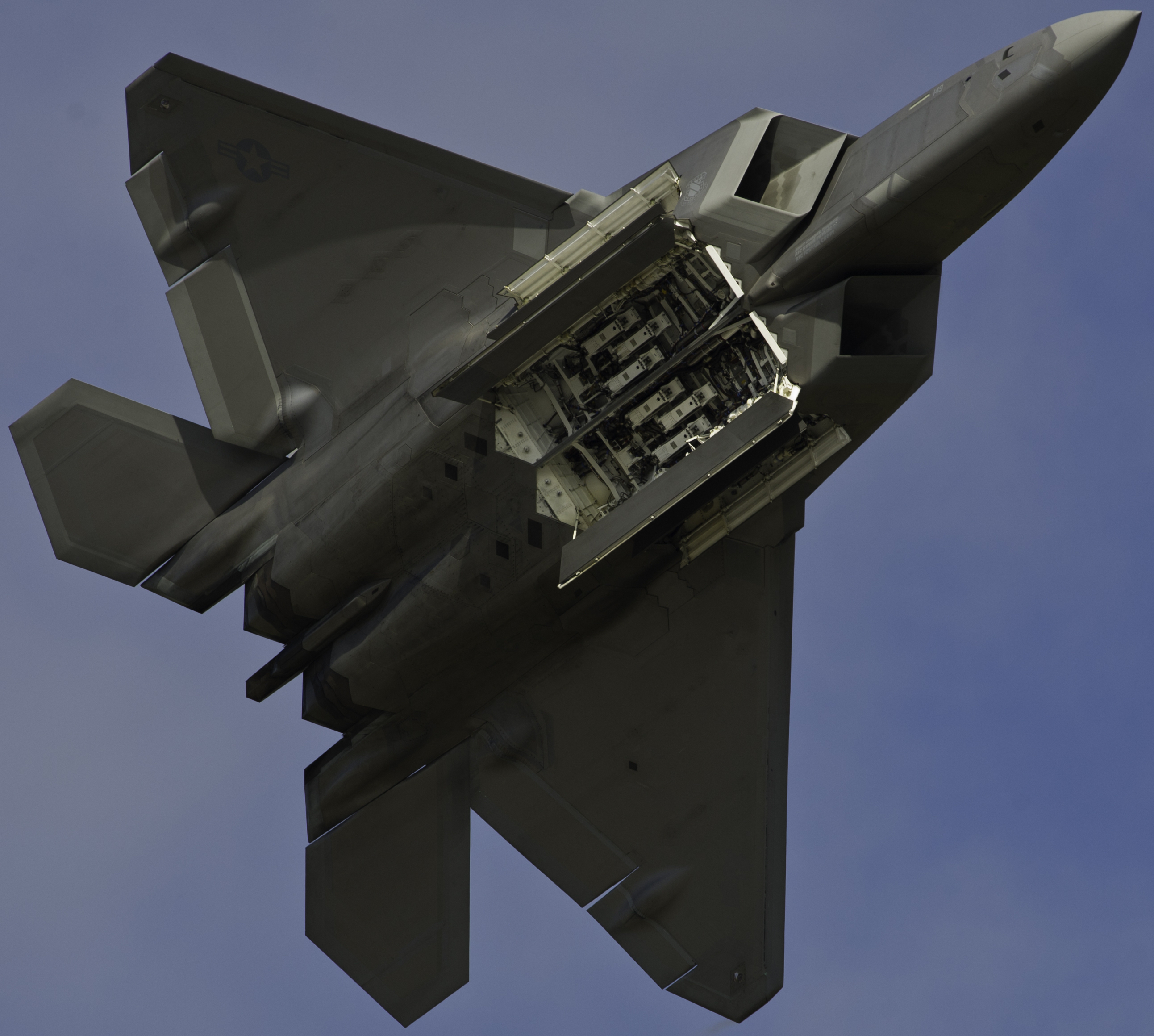 F-22 underside doors open